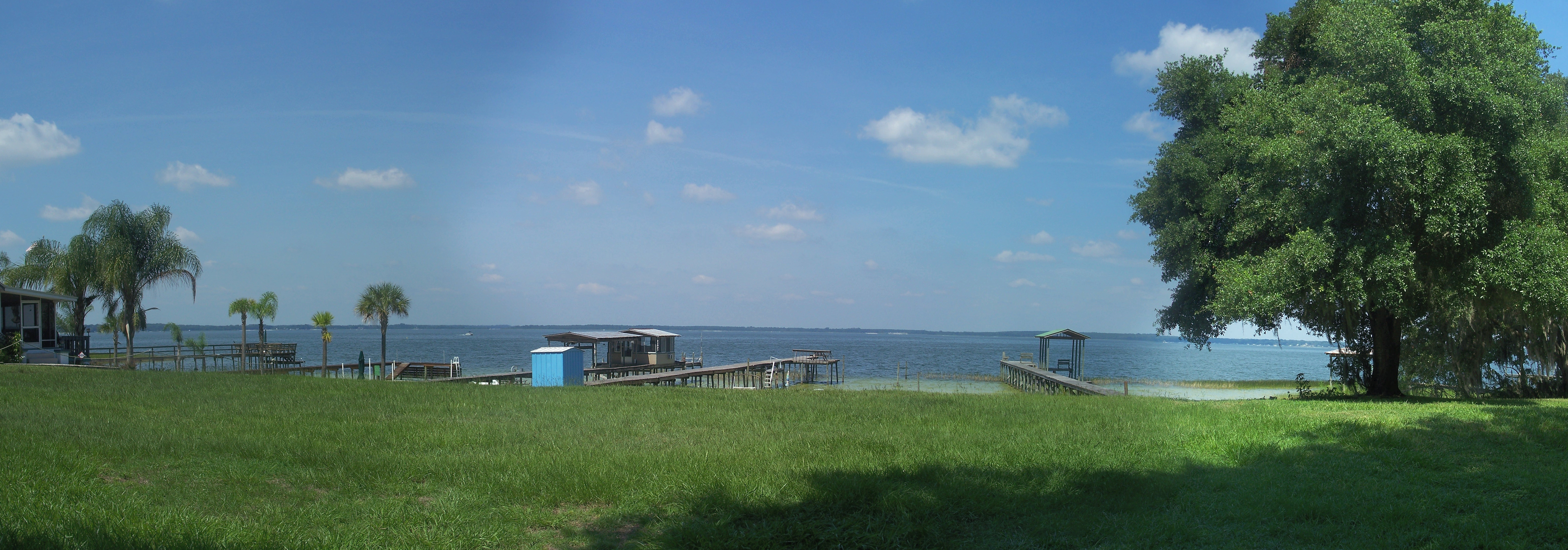 Lake Weir: Panorama view.